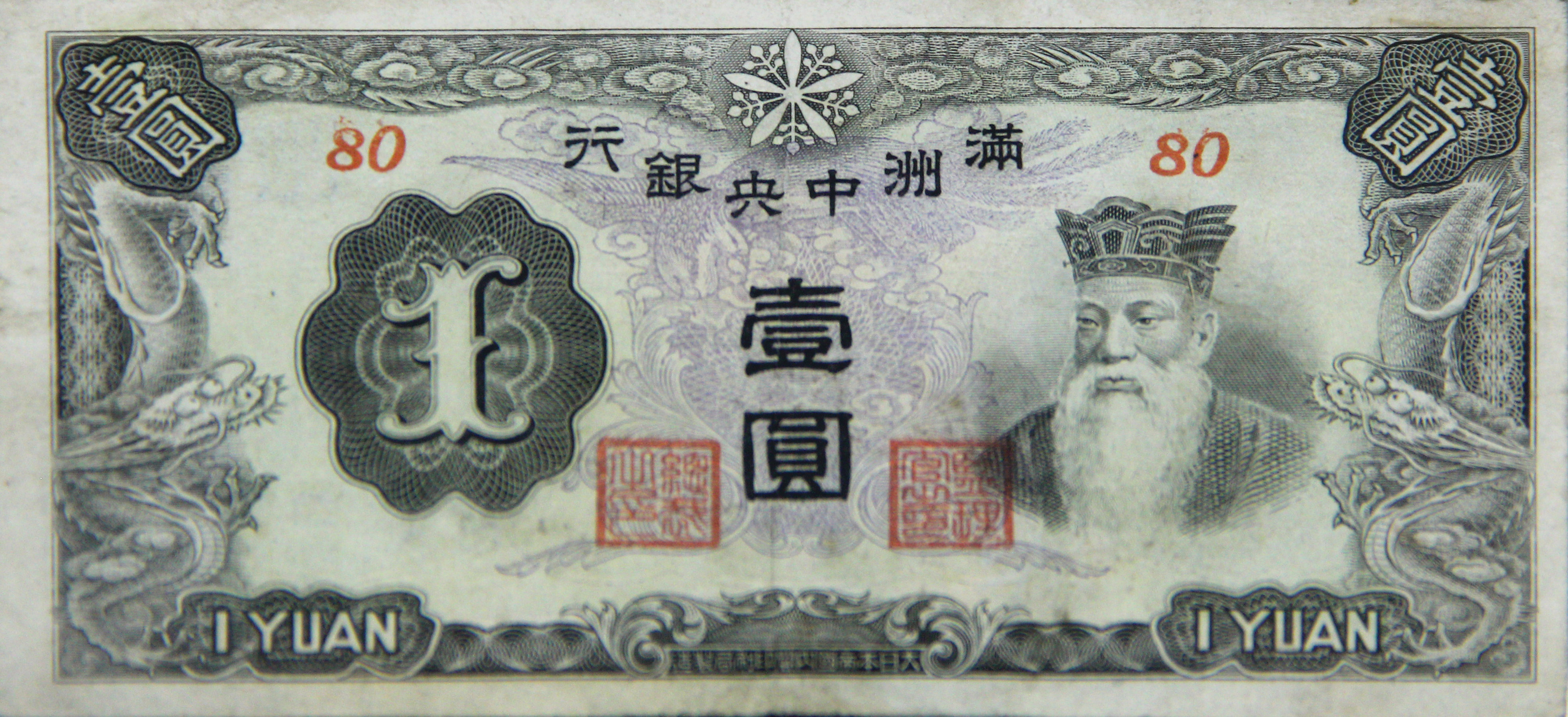 滿洲中央銀行發行的壹圓面值紙幣。由日本帝國內閣印刷局製造。展出於廣州農講所。